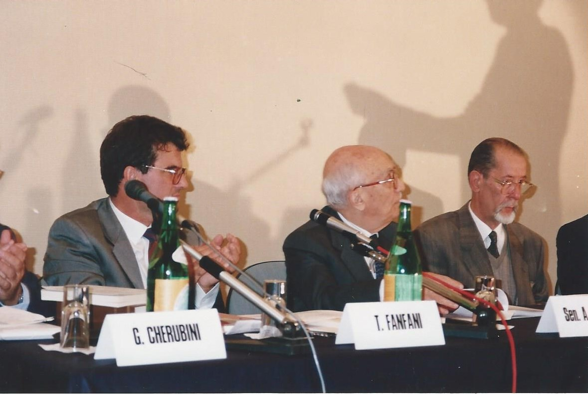 Nenuille opera propria